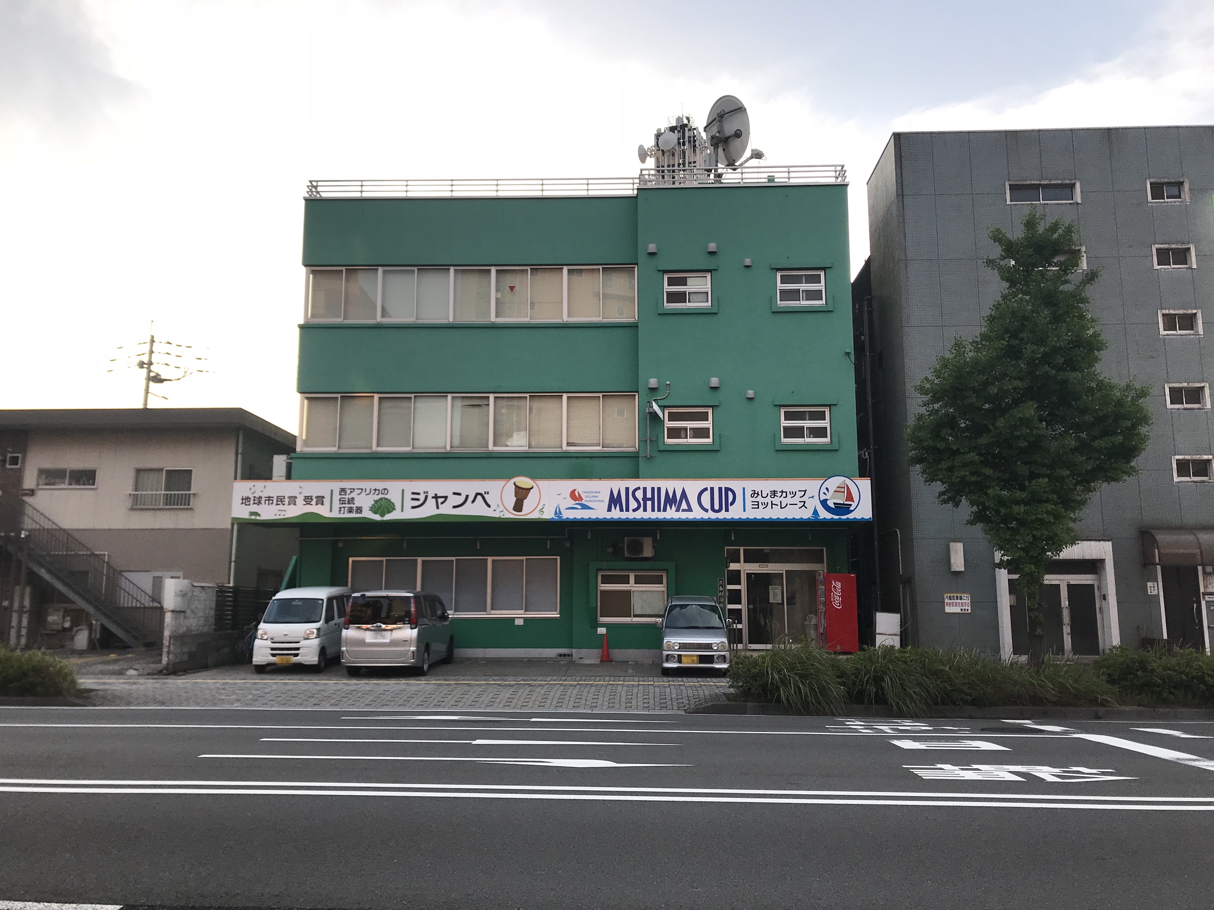 三島村役場